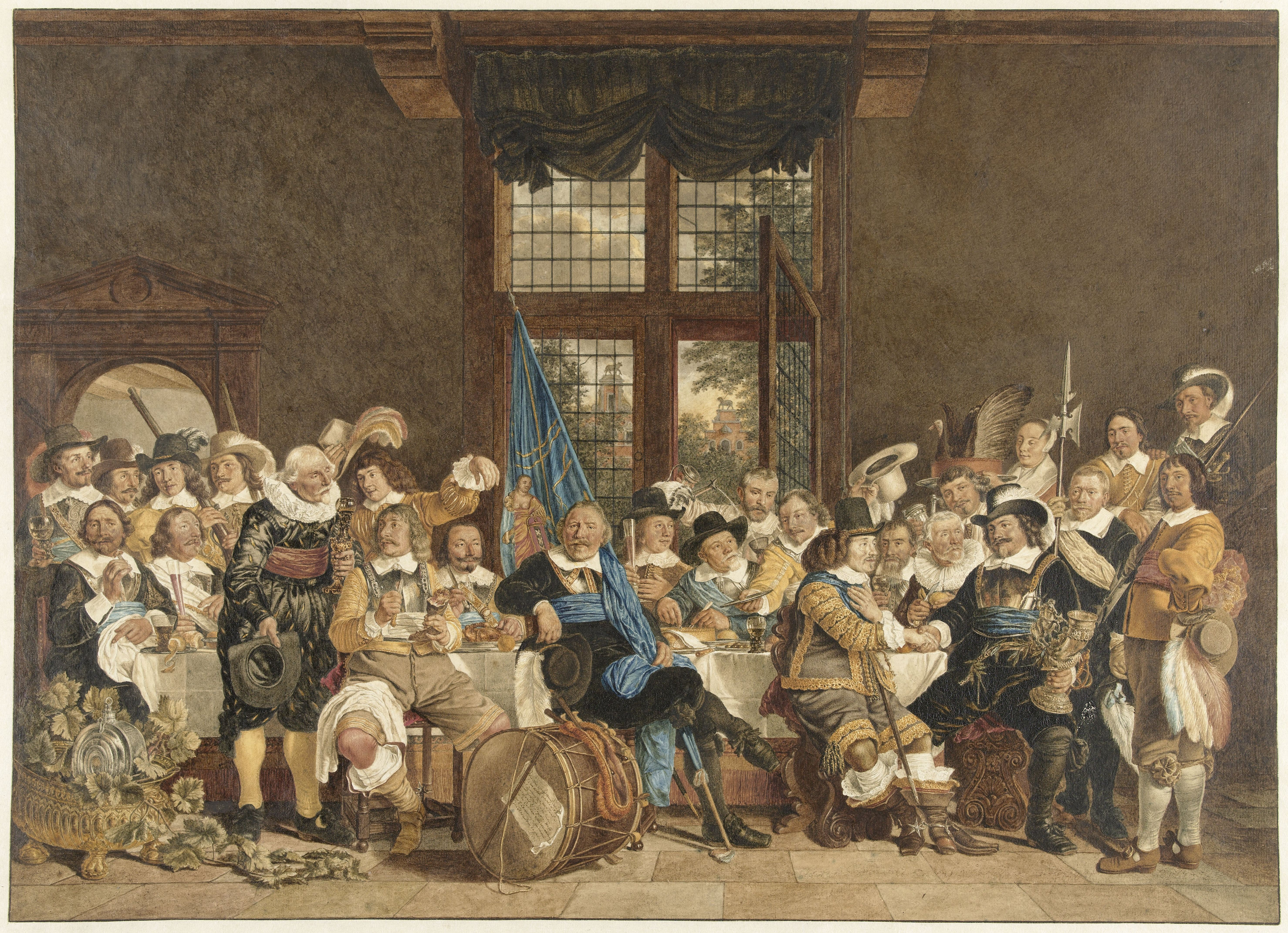 De schuttersmaaltijd in de Voetboogdoelen te Amsterdam ter viering van het sluiten van de vrede van Munster, 18 juni 1648, Jacob Cats (1741-1799), naar Bartholomeus van der Helst, 1779, 372 x 516 cm, Rijksmuseum